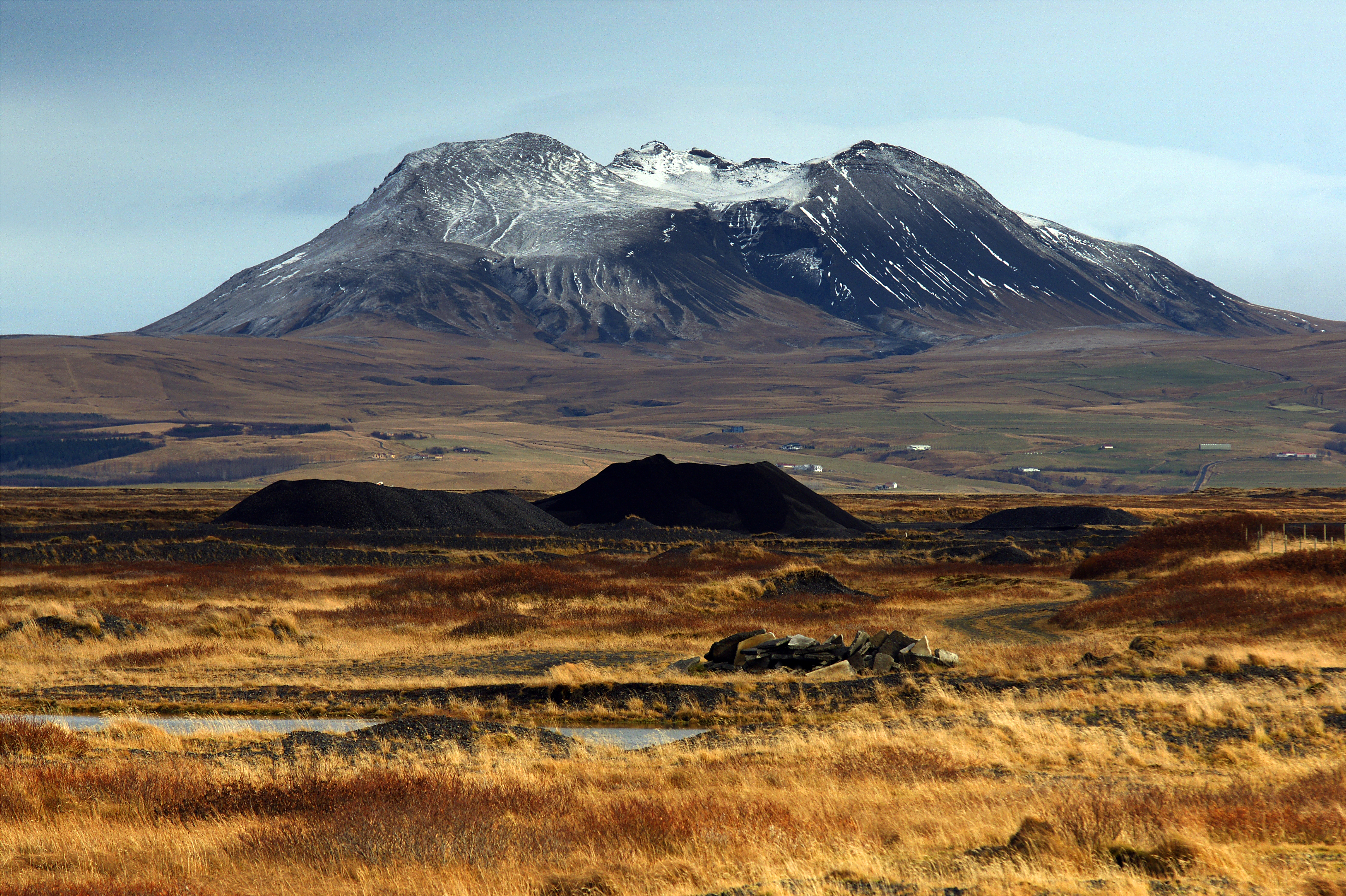 Þríhyrningur